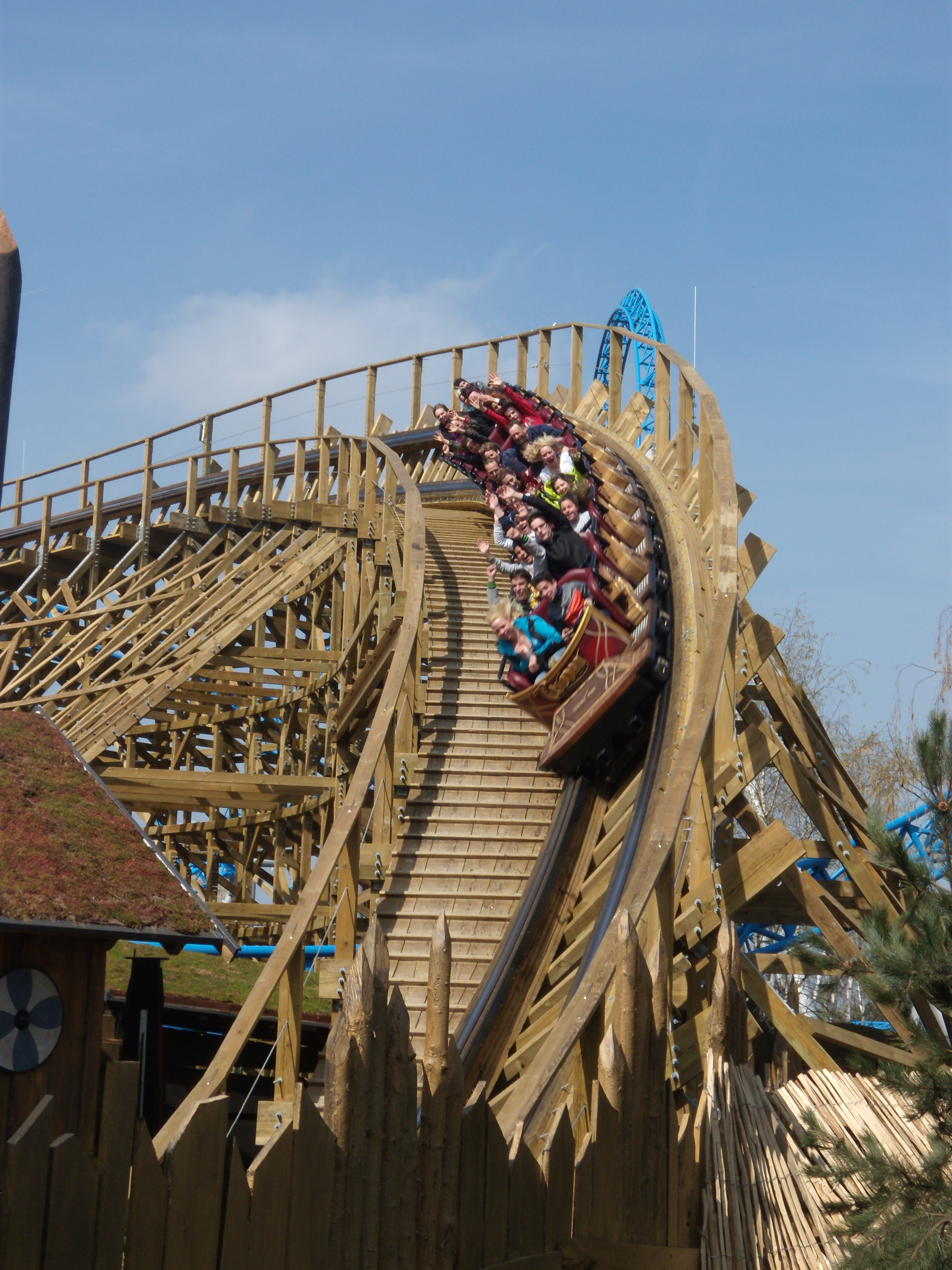 Montagnes russes en bois Wodan - Timburcoaster dans le parc allemand Europa-Park